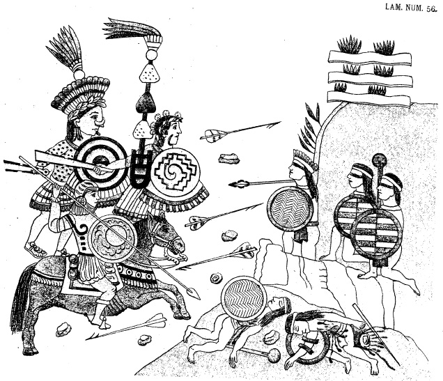 Lámina 56 del Lienzo de Tlaxcala enseñando la conquista del pueblo llamado Tlaltenanpan.